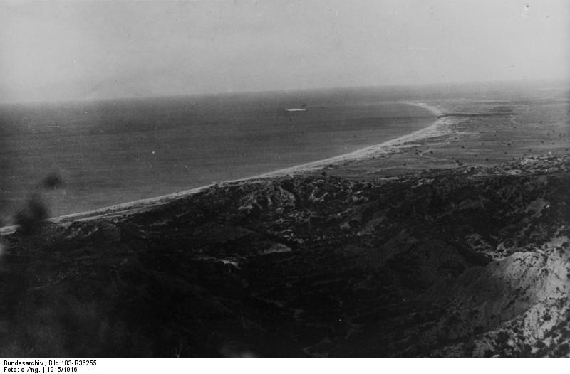 Türkei, Dardanellen, Suvla-Bucht [I.] Weltkrieg. Dardanellen. Blick von den Gräben der 9. Division auf Ari Burnu nach der Suvla-Bucht. Im Hintergrund ein englisches Lazarettschiff und ein Zerstörer.